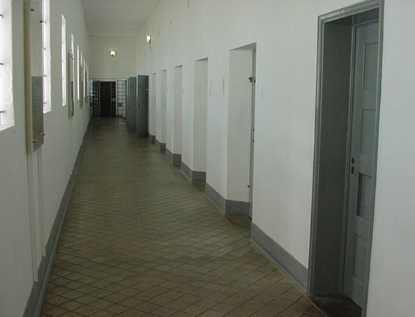 Interieur de la Prison de Peniche